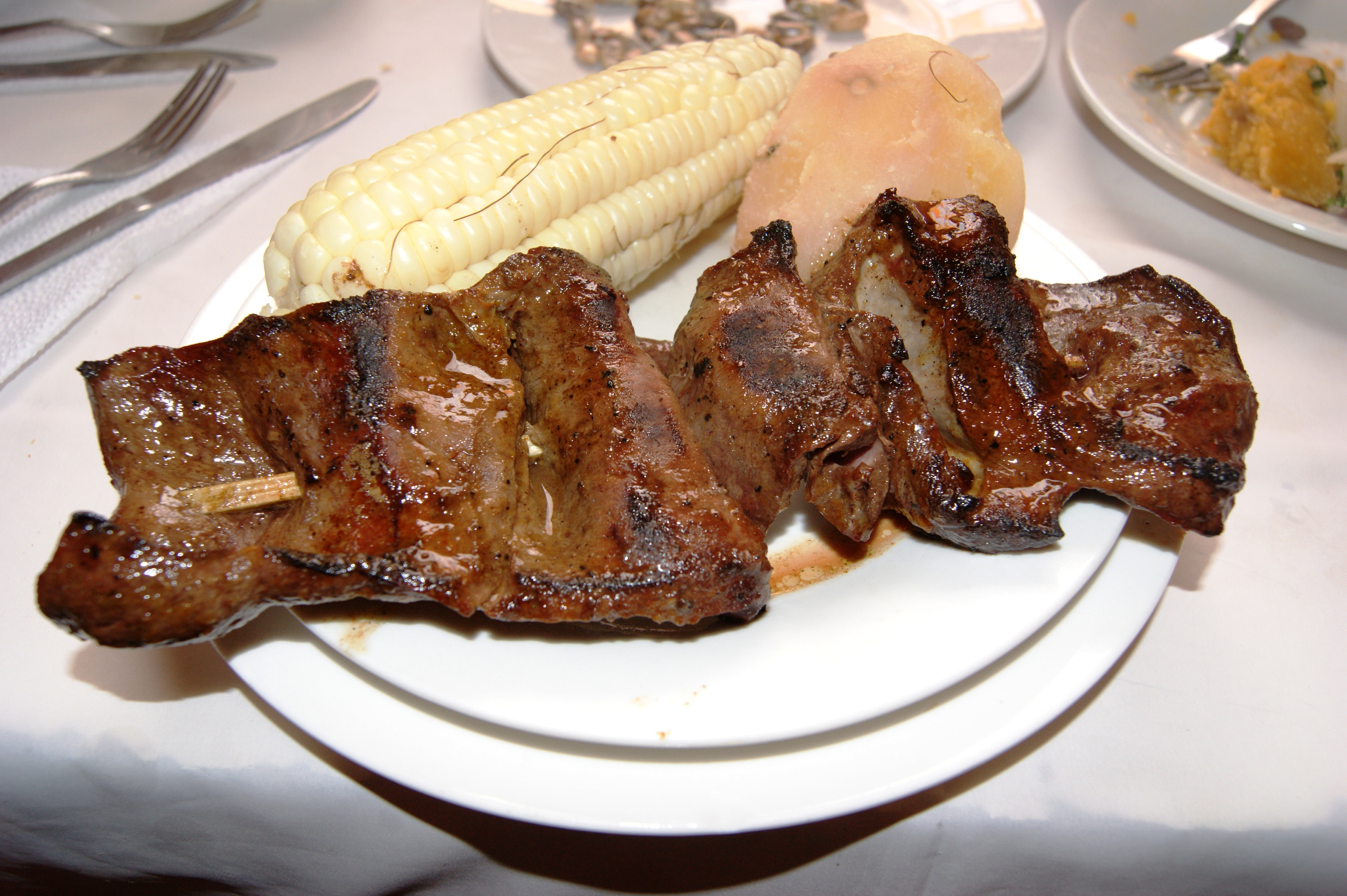 Anticucho. Región de Tacna, Perú.